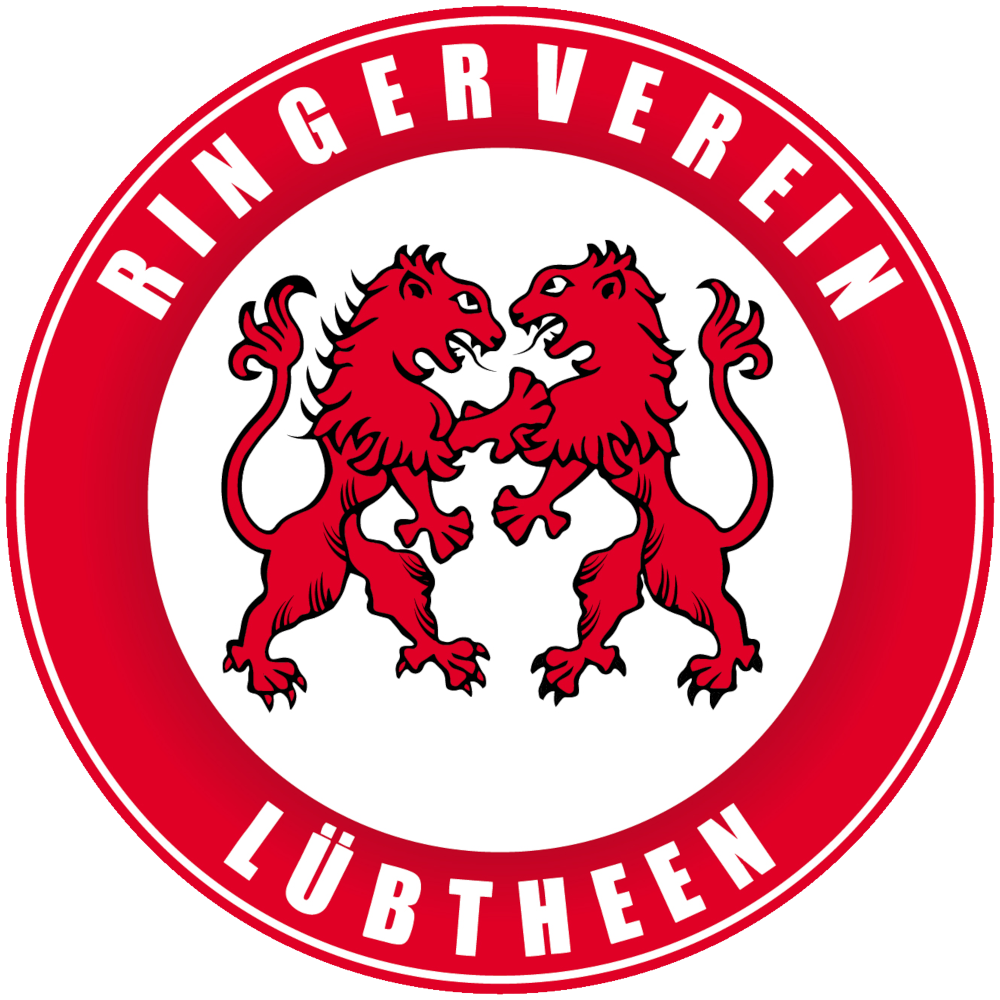 Das Vereinslogo des RV Lübtheen. Zwei Löwen (ähnlich aus dem Stadtwappen) die sich wie im Ringkampf gegenüberstehen.